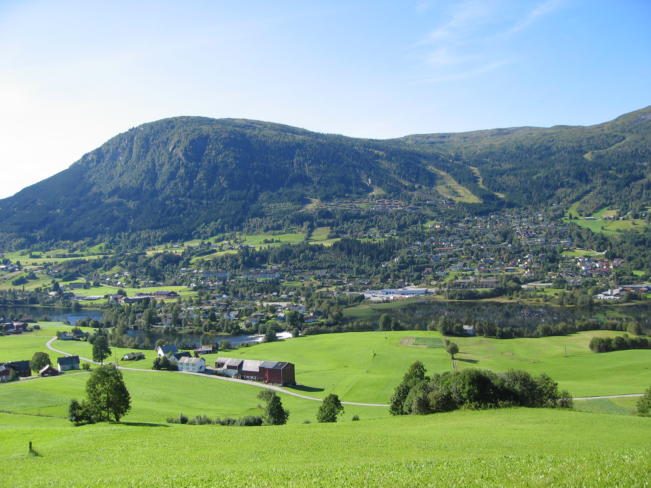 Skulestadmoen på Voss